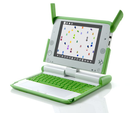 XO laptop, front view